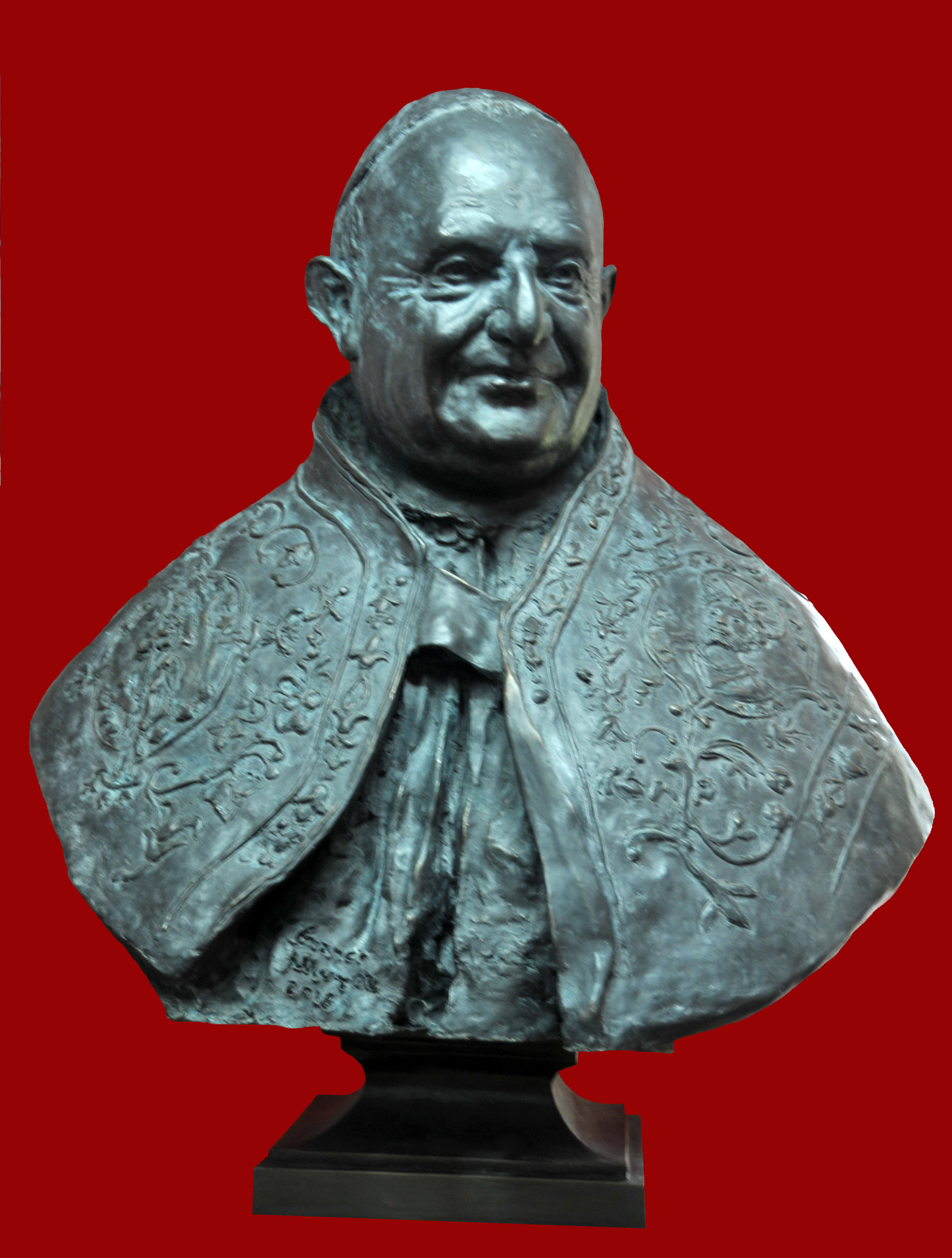 Papa Giovanni XXIII Busto in bronzo opera di Franco Murer collocato alla Scuola Grande di San Rocco a Venezia il 28.10.2018